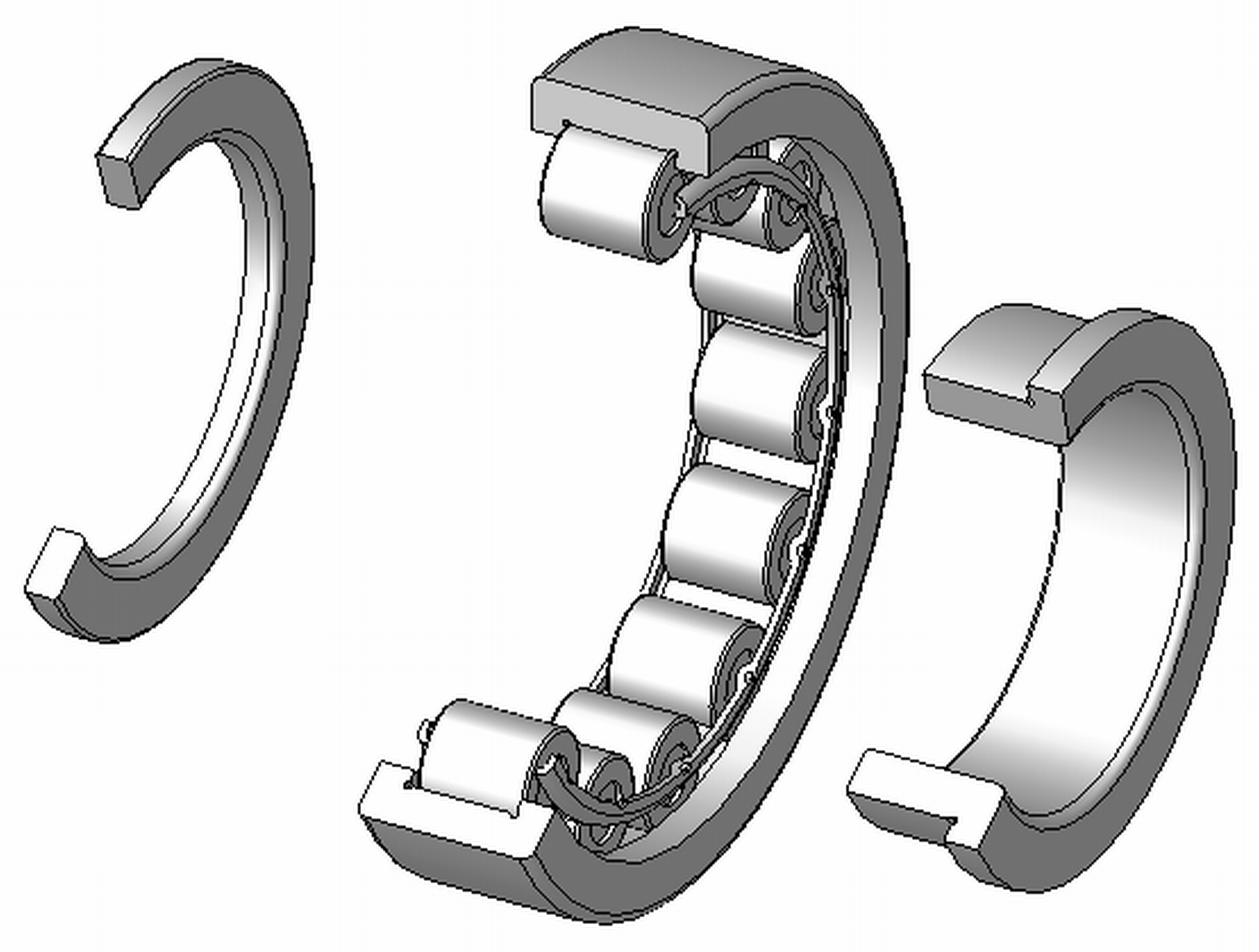 Zylinderrollenlager, Innenring mit einem Bord, mit Bordscheibe, Aussenring mit zwei Borden, Blechkäfig aus Stahl, zerlegbar, Explosionsdarstellung, 120°Schnitt, Hinweis: Innenaufbau des Lagers (insbesondere des Kaefigs) variiert je nach Hersteller und Baugroesse rolling contact bearings